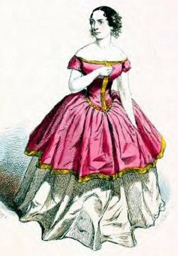 Rosine Stoltz im Kostüm "der Favoritin" Fotograf/Zeichner: lithographie A. Collette Datum: 08.07.2006